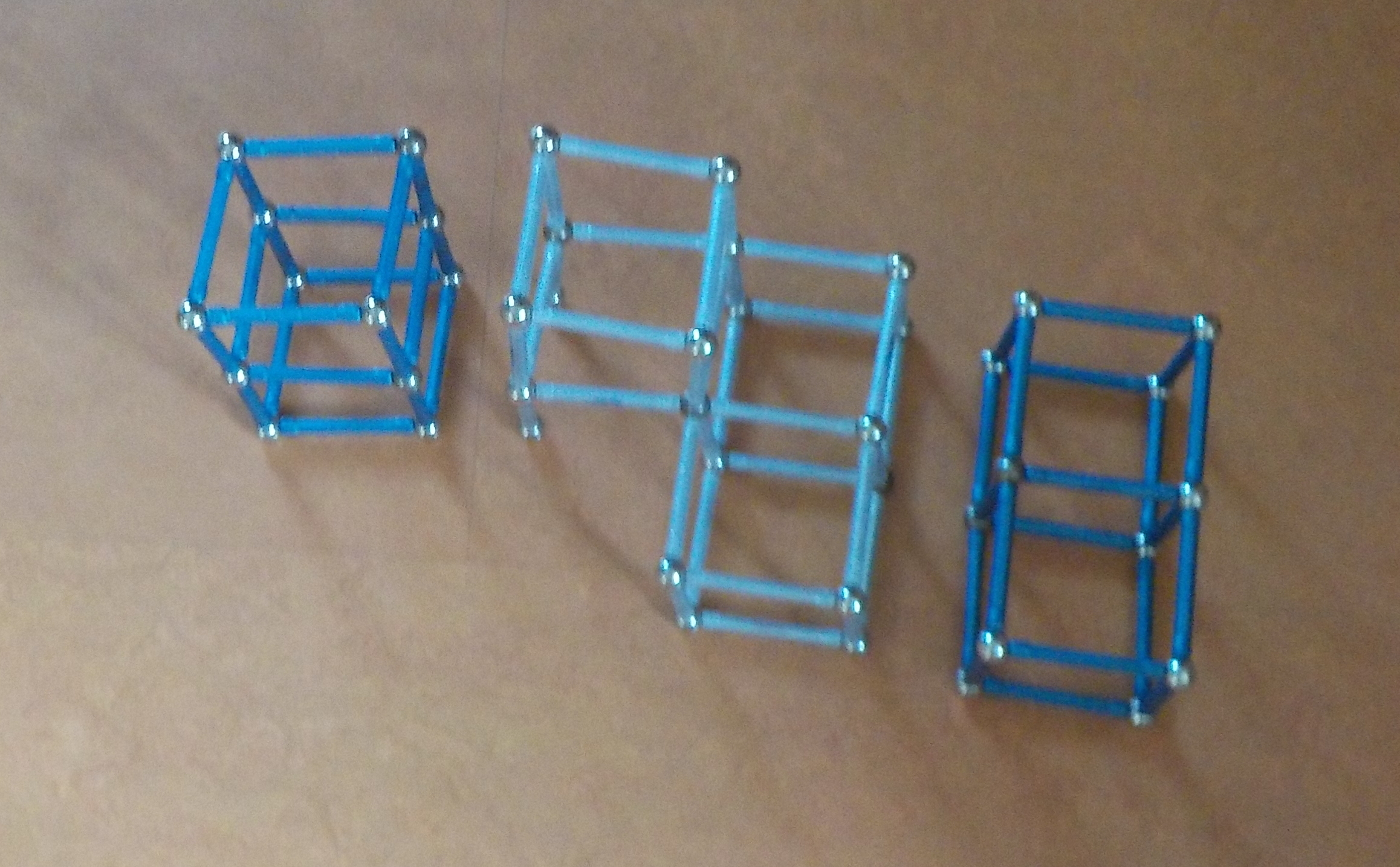 Na obrázku jsou vidět 3 stavby. K vidění jsou i rozdílné barvy: modrá a stříbrná